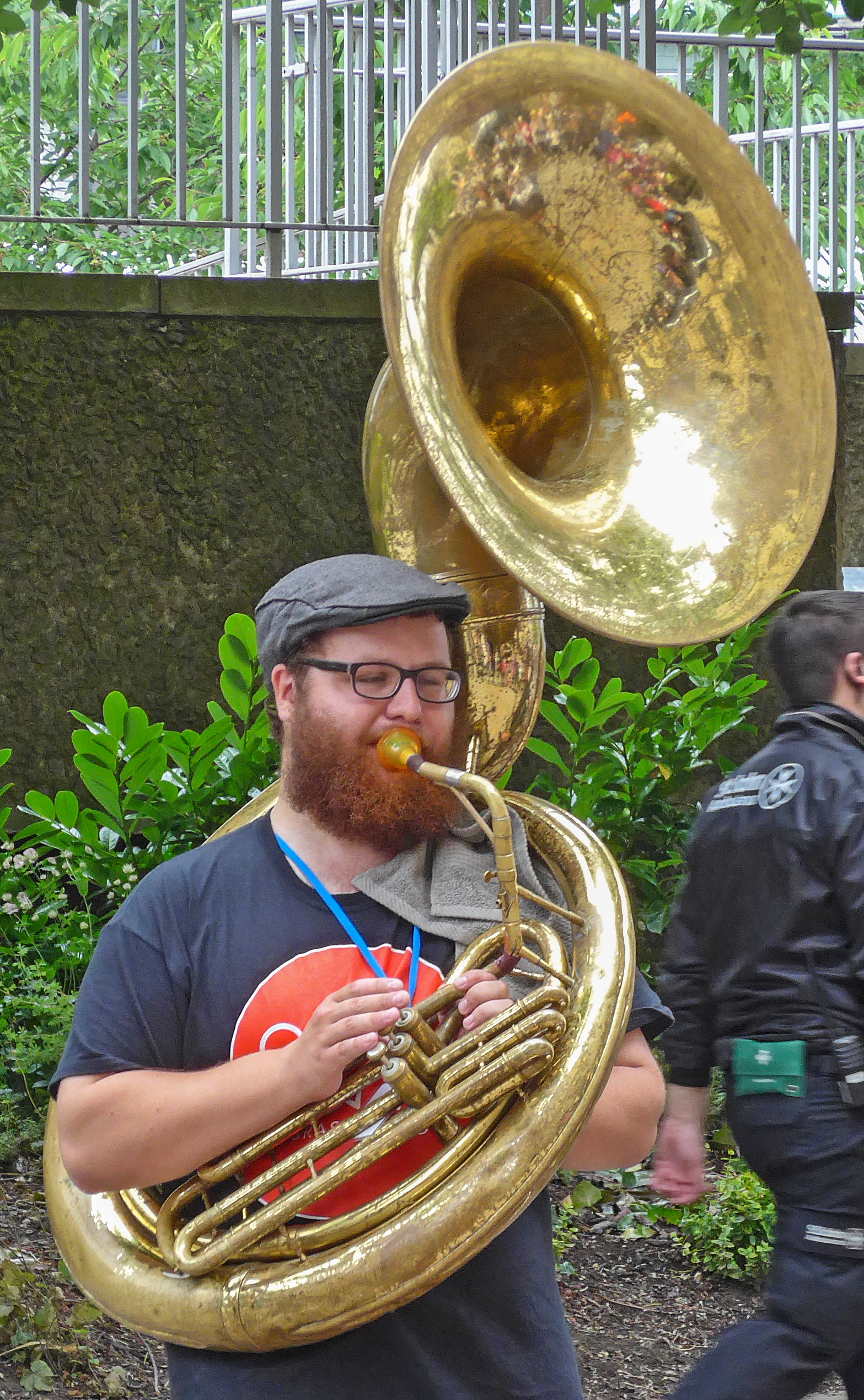 Bradford Festival